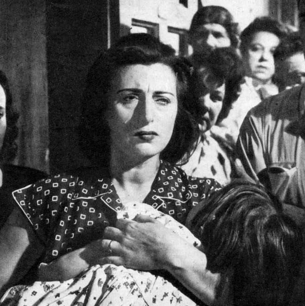 Anna Magnani in "Bellissima" (L.Visconti - 1951)